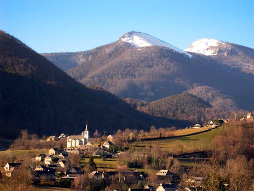 Photo montrant une vue d'ensemble du village de Laborde(65)